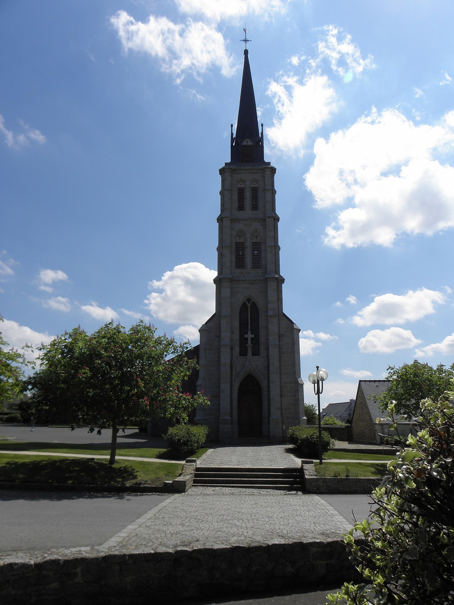 Église Saint-Laurent de Trévron (22). Tour-clocher. Architecte : M.C. Ramard de Dinan. (1865-1869).